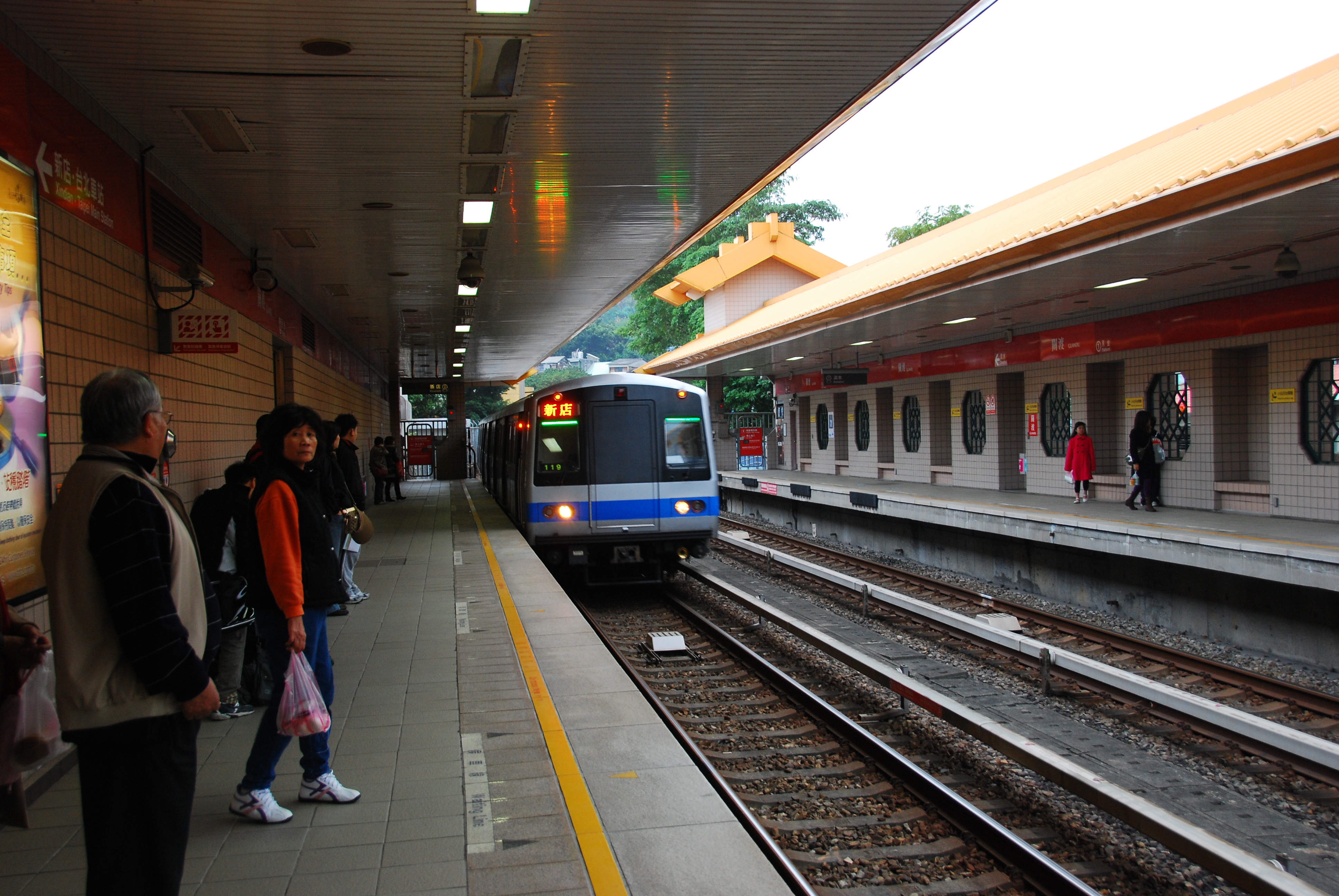 台北捷運關渡站第二月台，高運量電聯車119進站。